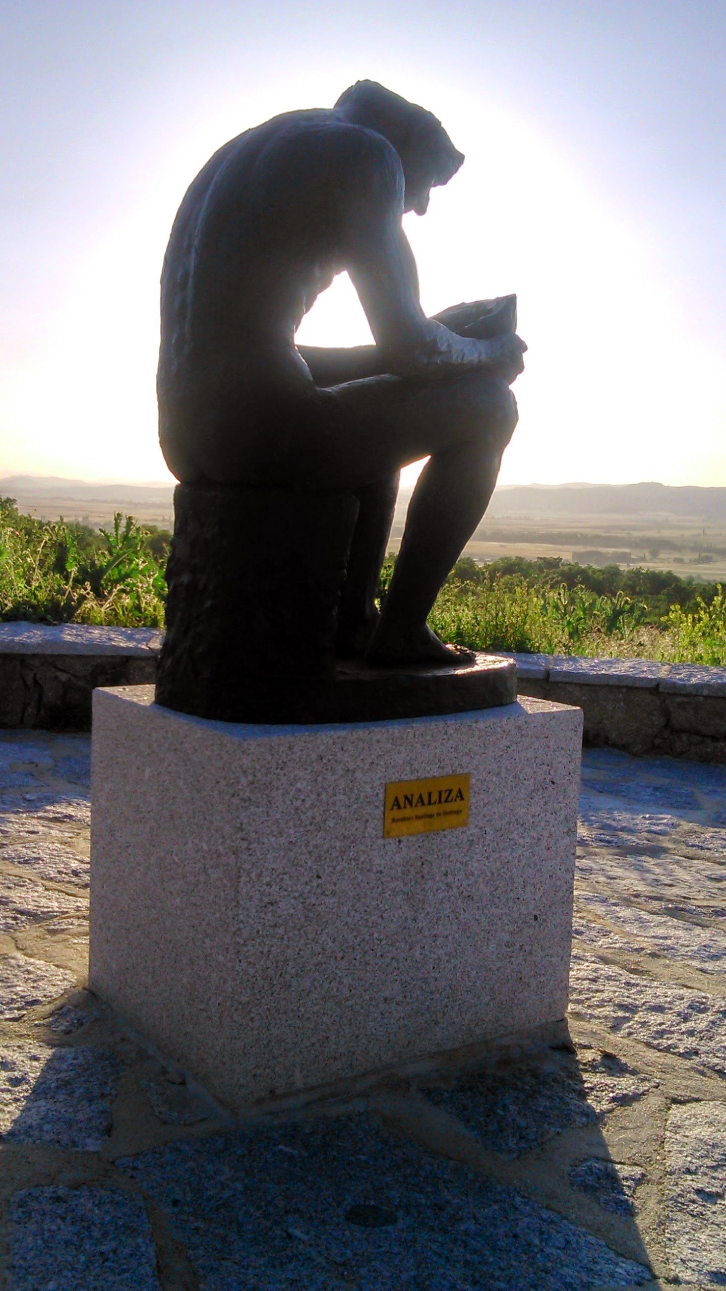 ANALIZA. Escultura de Santiago de Santiago situada en Navaescurial (Ávila)